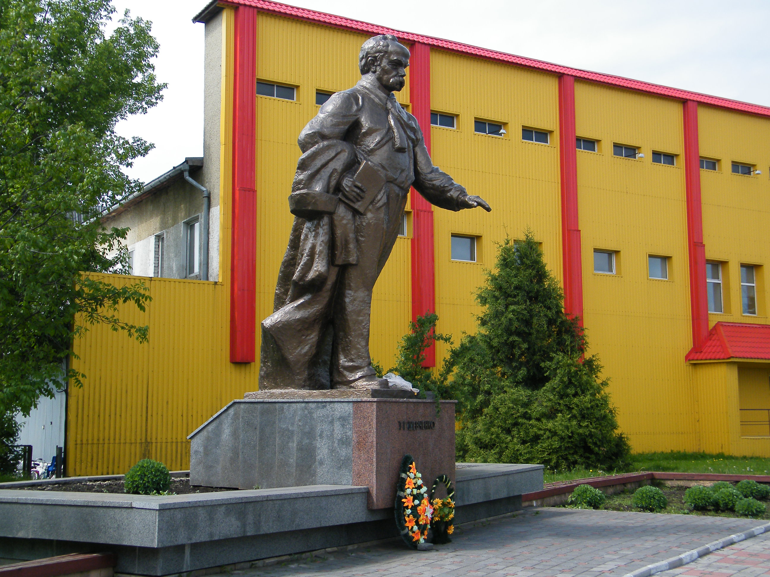 Памятник Тарасу Шевченко